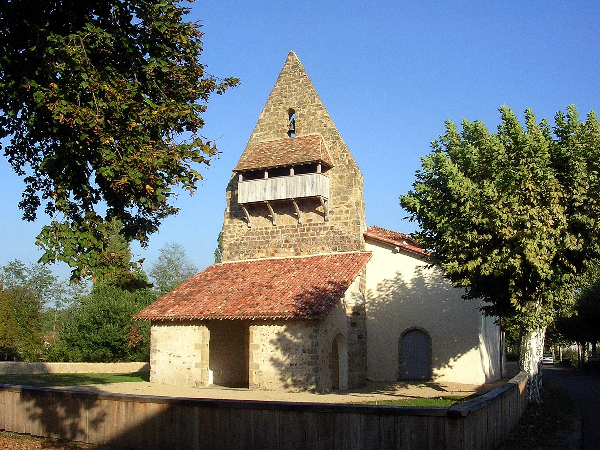 Église Saint-Antoine de Garein, dans le département français des Landes